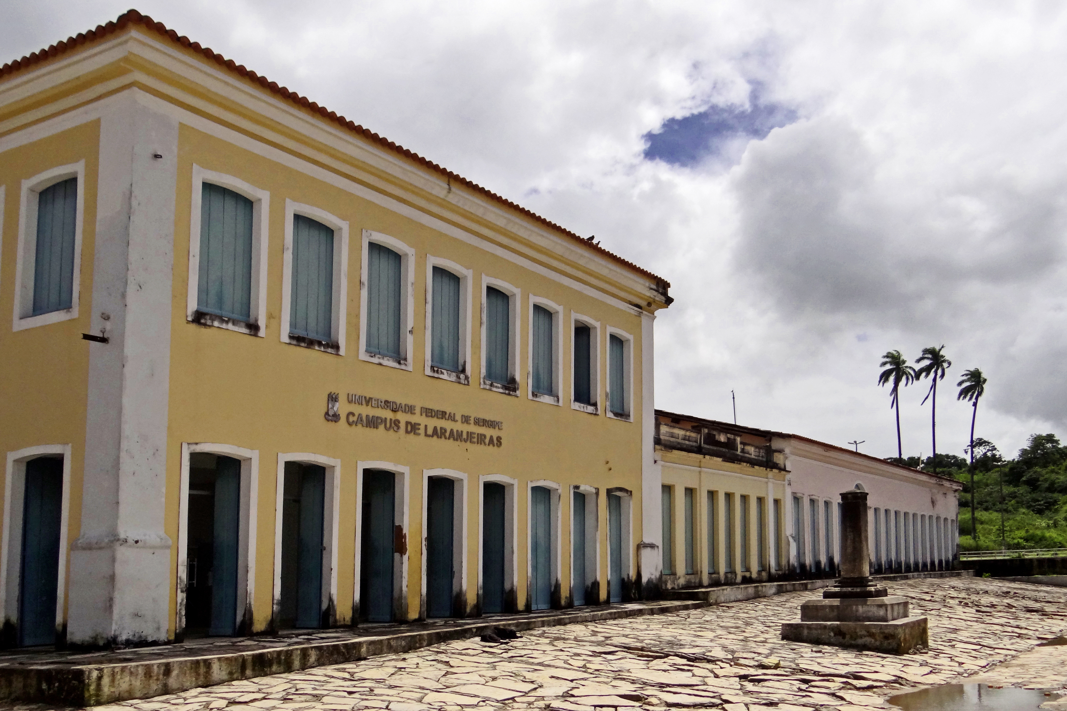 Laranjeiras, SE: conjunto arquitetônico e paisagístico O município de Laranjeiras, a 23 quilômetros de Aracaju, é um dos poucos onde ainda se pode ver a força da arquitetura colonial. Ruas, casarios, igrejas, tudo respira a mais pura história. Laranjeiras já foi a mais importante cidade sergipana. Berço da cultura, educação, política e da economia. Laranjeiras é uma cidade tombada pelo Instituto do Patrimônio Histórico e Artístico Nacional - IPHAN, desde 1996, e também pelo governodo estado de Sergipe há mais tempo devido à beleza de suas ruas, de suas igrejas e de seu casario construído em modelo português nos séculos XVII, XVIII e XIX. Além de que possui monumentos tombados individualmente. A Universidade Federal de Sergipe incluiu o Curso de Bacharelado em Arqueologia na cidade por se tratar de um sítio arqueológico a céu aberto. O Campus localiza-se no centro histórico de Laranjeiras, no Quarteirão dos Trapiches, ao lado do Mercado.